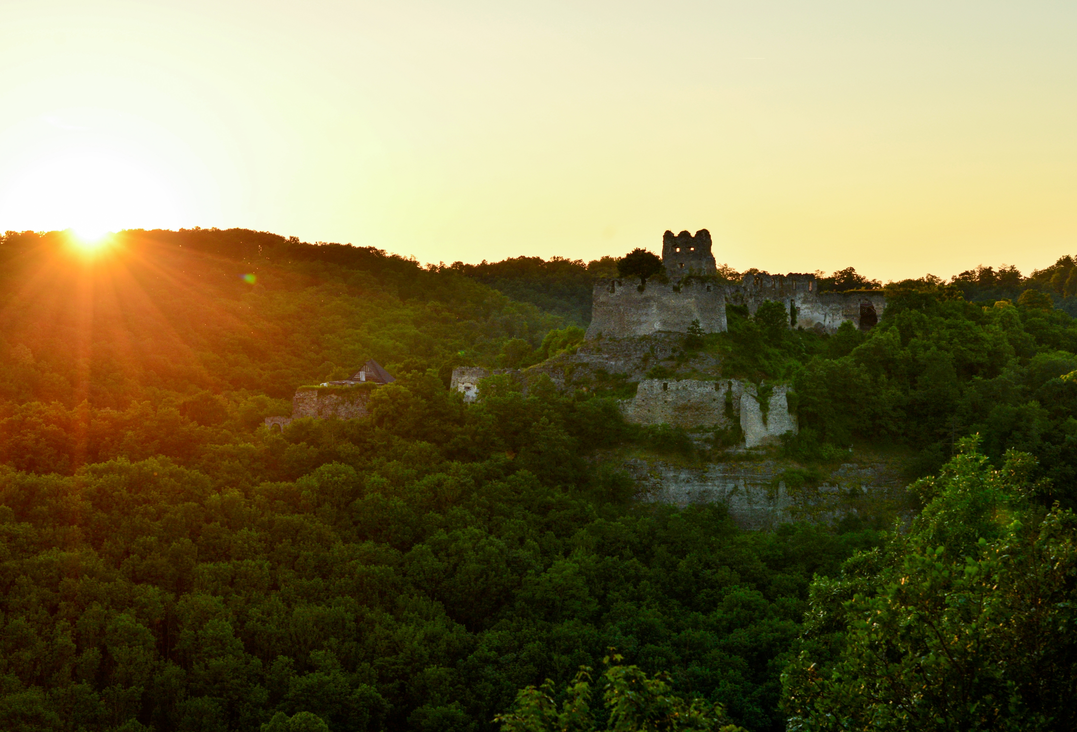 Hrad Čabraď predstavuje neobyčajne prekrásne spojenie prírodných krás a umu našich predkov. Umiestnený v ničím nerušenom prírodnom prostredí, bez rušivých moderných prvkov je perlov okolitej krajiny. Stavitelia dômyselne situovali hrad na mieste, ktoré riečka Litava obteká z troch strán. (